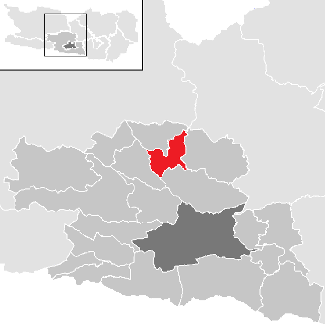 Bezirk Villach-Land